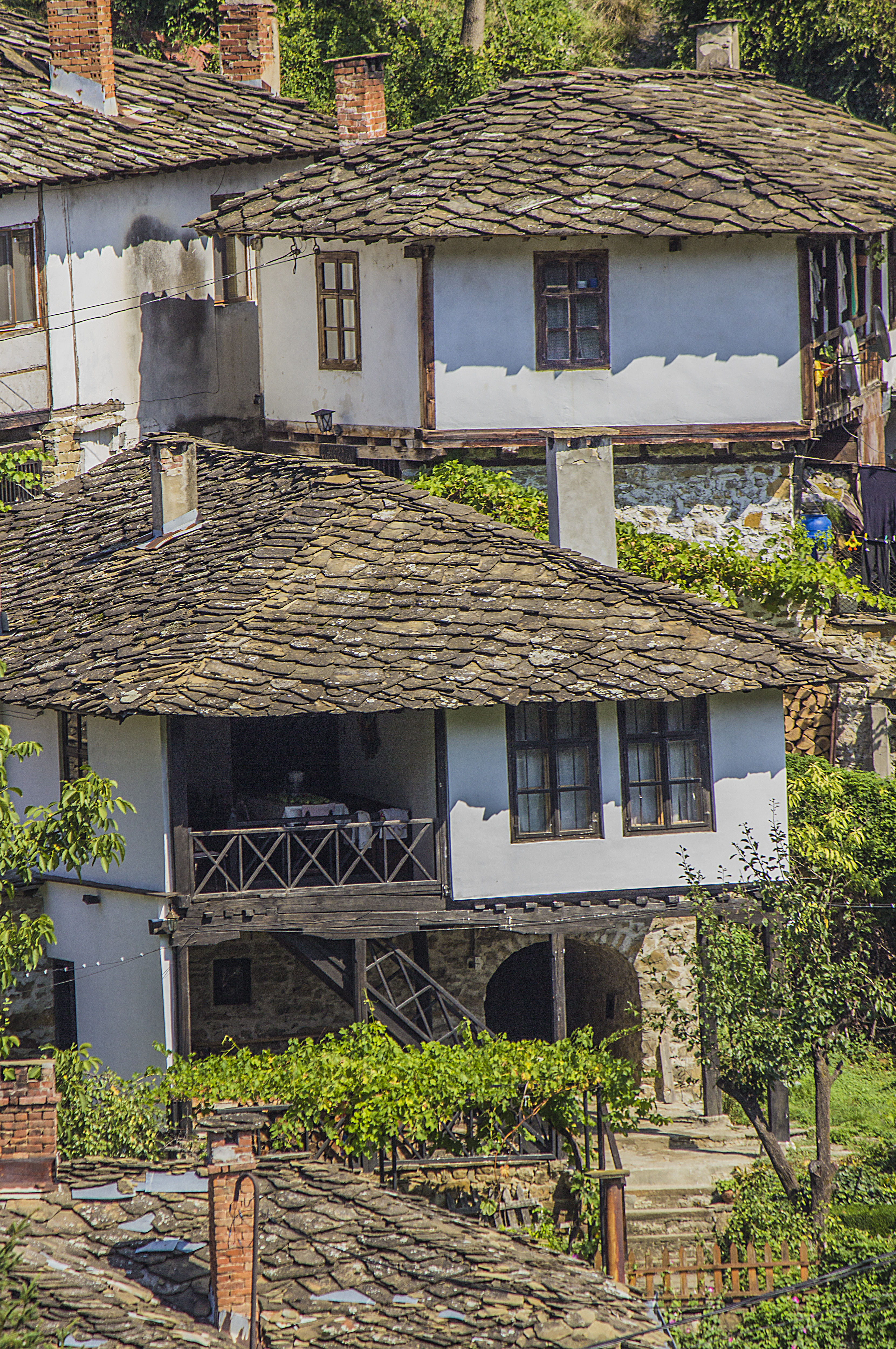 АИР "Вароша"